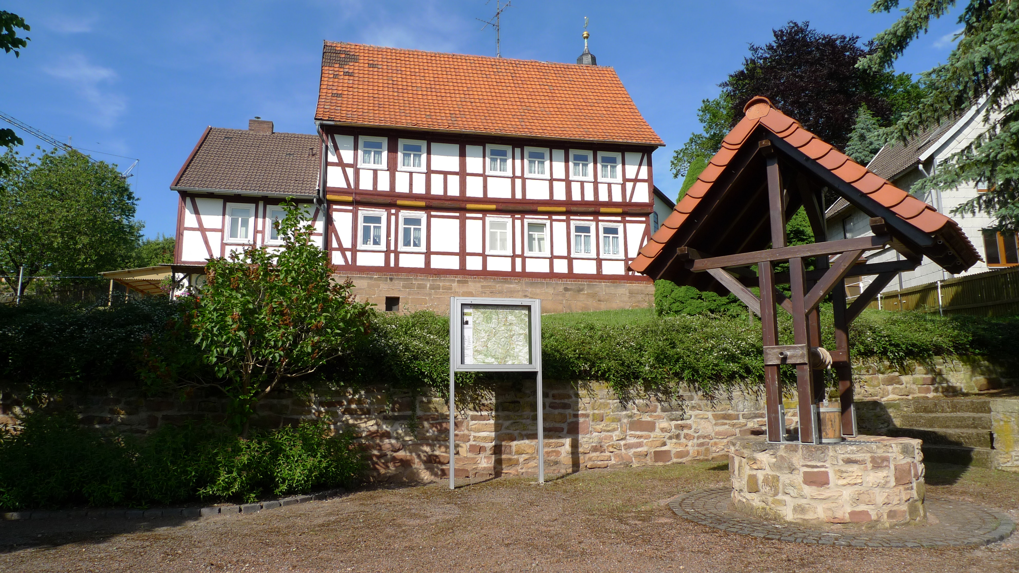 Ortszentrum von Zwinge im Eichsfeld